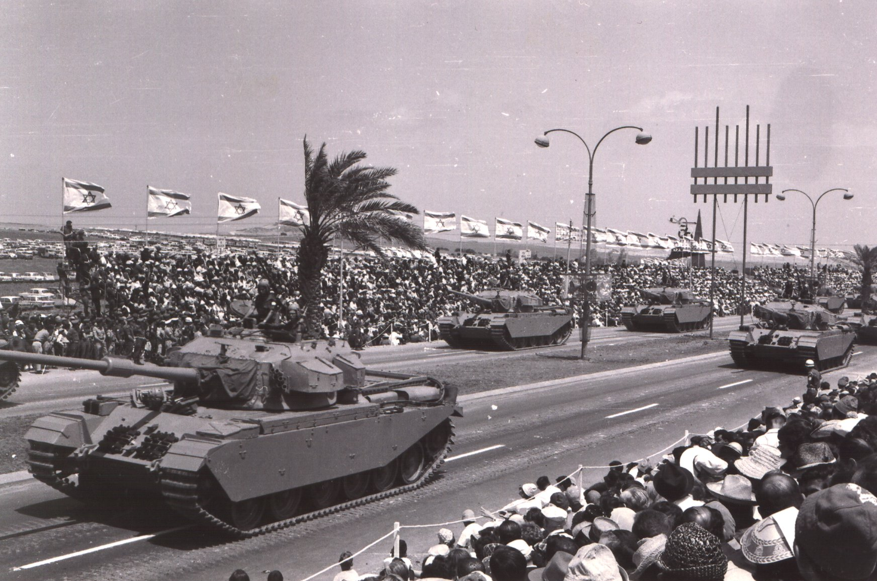 Centurion tanks parade in Tel-Aviv in an I.D.F. parade in 1965.טנקי צנטוריון צועדים במצעד צה"ל בתל אביב, 1965